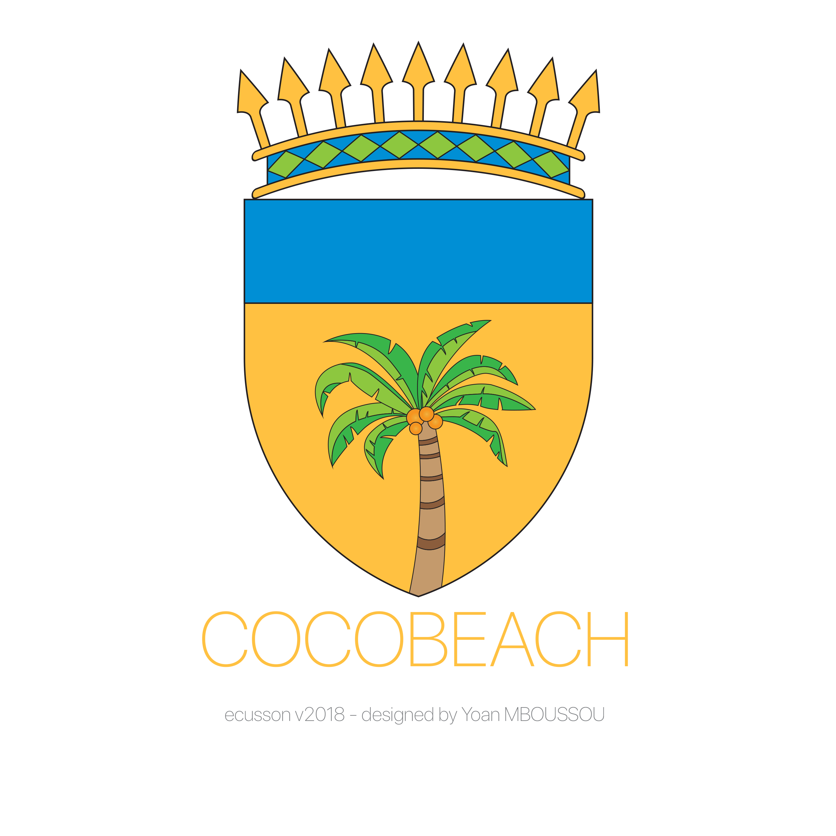 Ecusson de la ville de Cocobeach